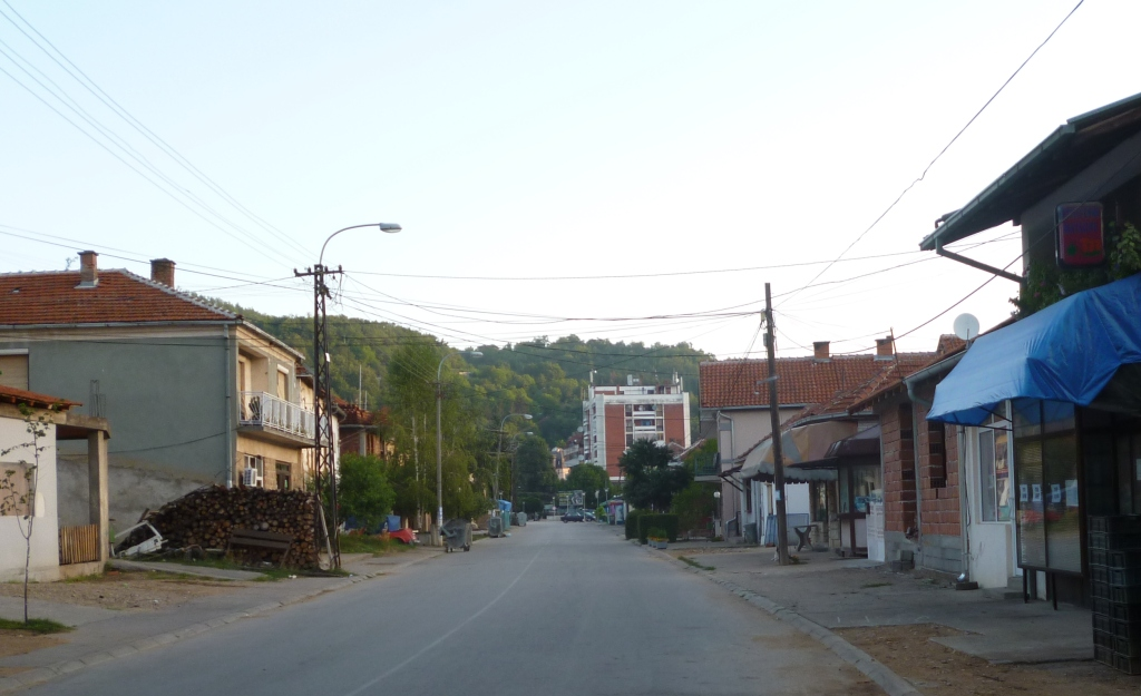 Улица Јабланичка у Медвеђи